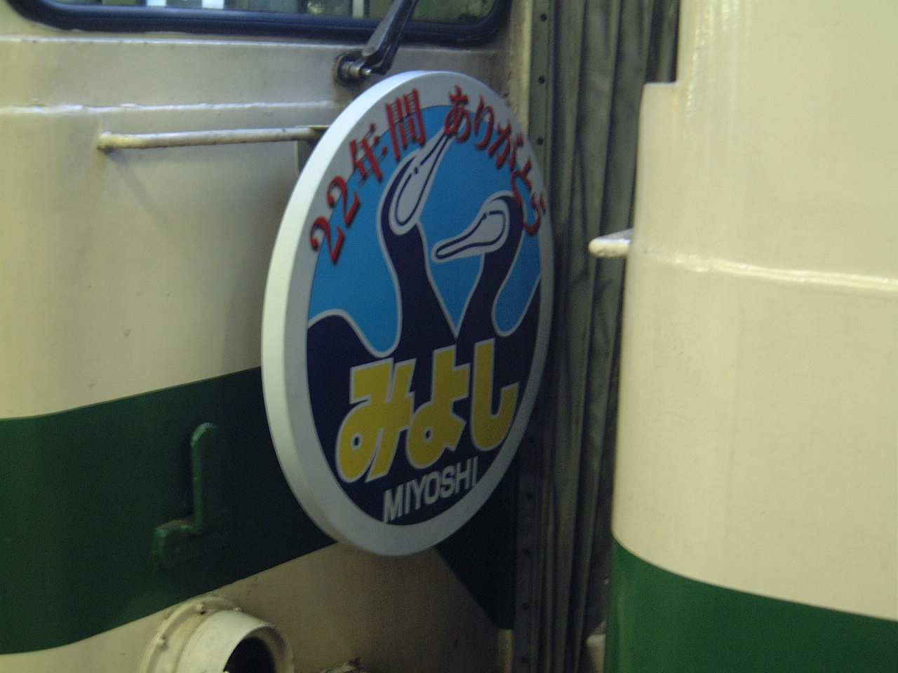 みよし号廃止前のヘッドマーク